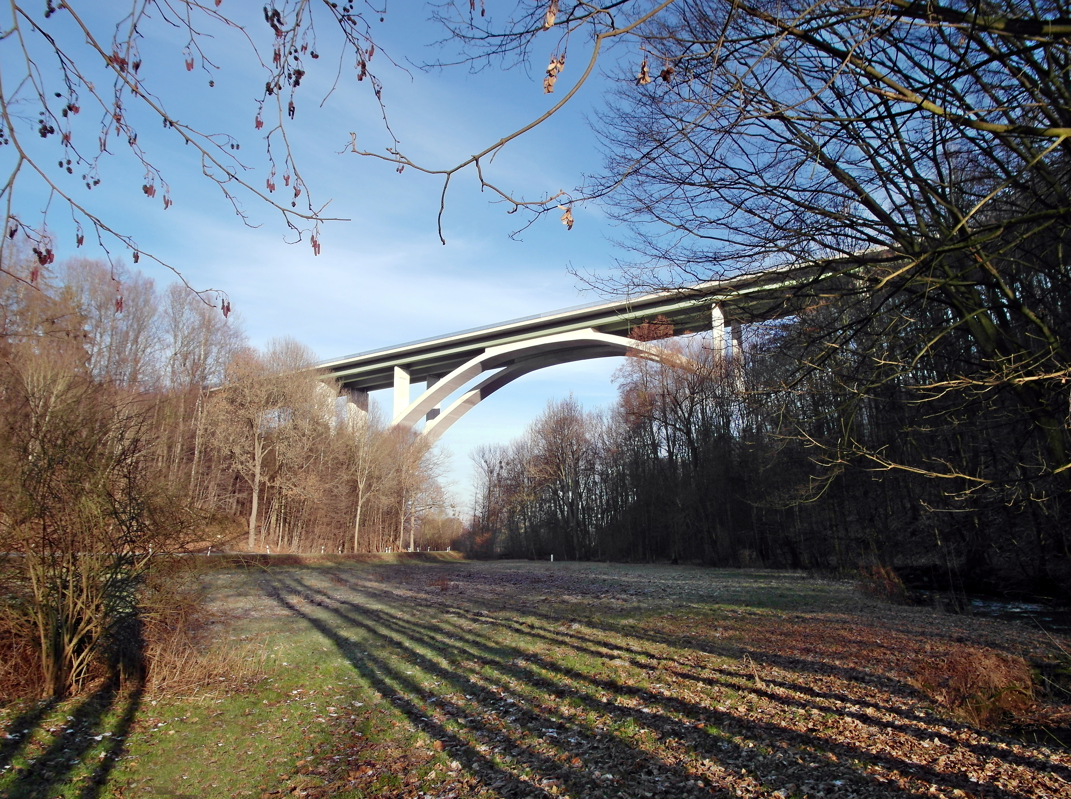 19.01.2019 Seidewitztalbrücke (GMP: 50.923211,13.890753) der Bundesautobahn A17 Dresden - Prag südlich von Pirna. Gesamtlänge 568 m, Bauzeit 2003-2006. Größte Stahlbetonbogenbrücke Sachsens. Die Herstellung des Bogens erfolgte im Freivorbau mit Hilfsabspannungen, die im Fels verankert waren. Sicht von Südwesten aus dem Seidewitztal. [SAM9064.JPG]20190119315DR.JPG(c)Blobelt